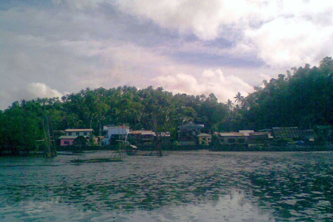 Calampong Pinabacdao Samar Philippines